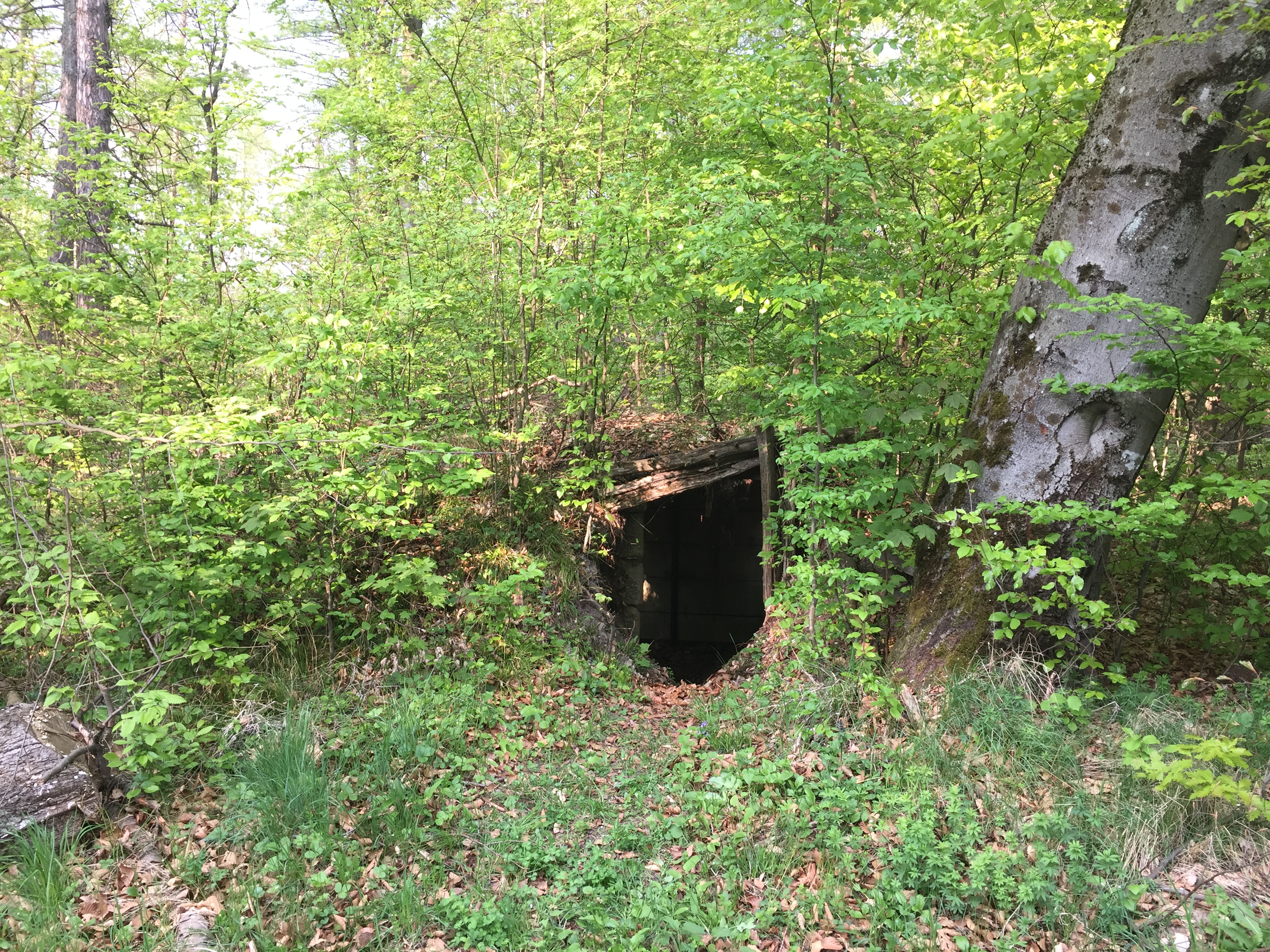 Pozostatky z bojiska /bunker/